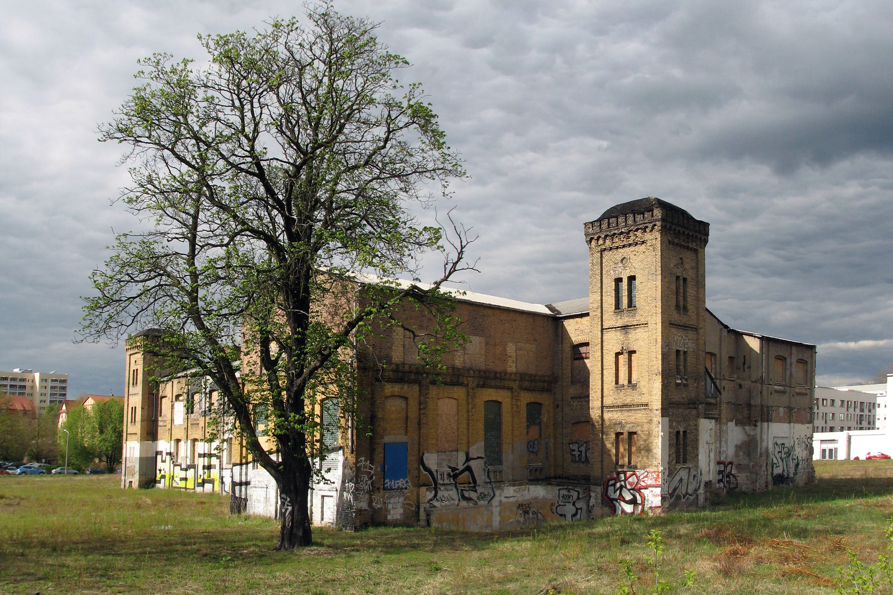 Baudenkmal: Ehemalige Jutefabrik, Lotte-Pulewka-Straße 41-43, Potsdam